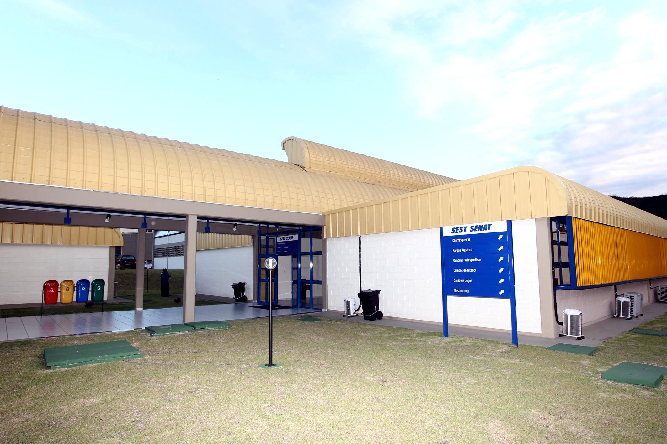 Unidade da SEST e SENAT em Itabuna (inaugurada em 2011).